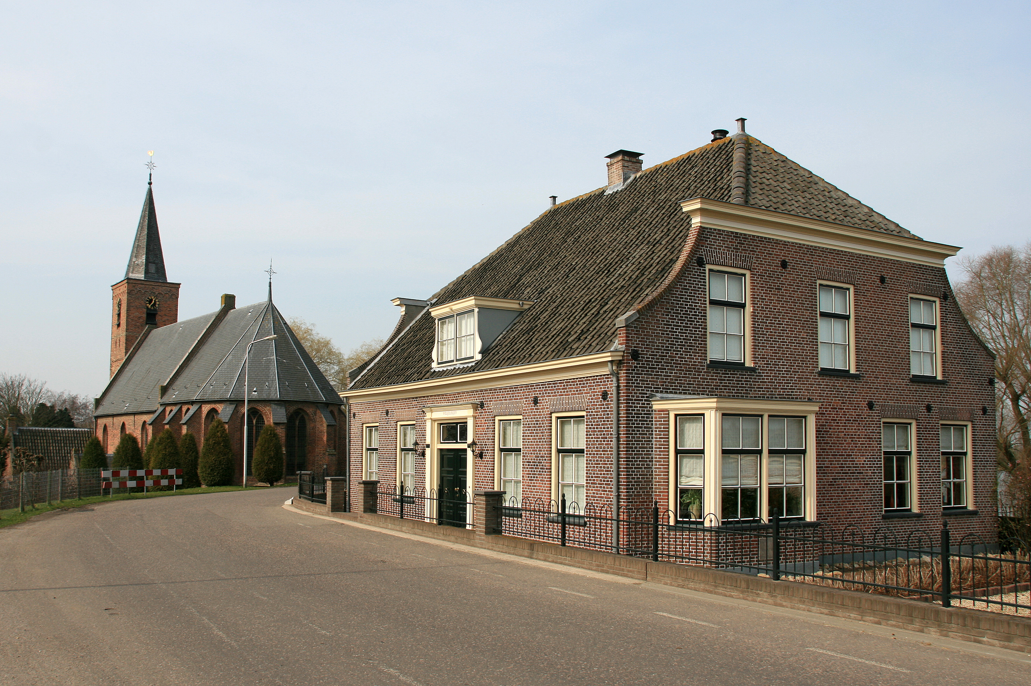 Buitendijks, in een bocht van de dijk, aan de rivier de Lek gelegen complex van voormalig Veerhuis behorend bij het complex veerhuis met schuur. Het veerhuis functioneert tegenwoordig als café met woning. Het veerhuis is volgens een datumsteen gebouwd in 1875 en wordt gekenmerkt door een Traditioneel-Ambachtelijke bouwstijl. Het Tienhovenscheveer, dat direct achter het veerhuis de veerdienst tussen Tienhoven en Jaarsveld verzorgde, is in het begin van de jaren dertig uit de vaart genomen.